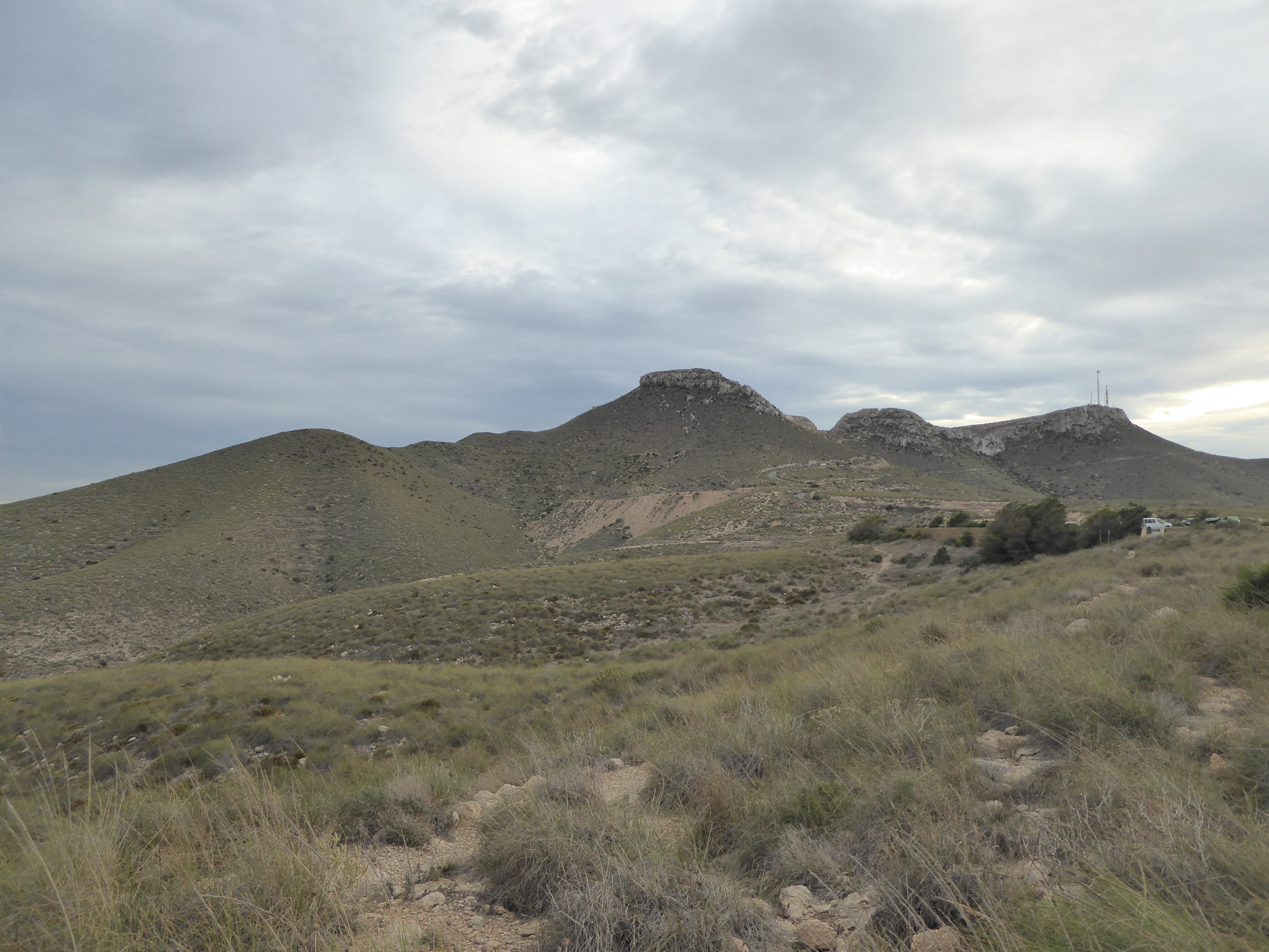 Mesa Roldán. En Carboneras, en el parque del Cabo de Gata - Níjar This is a photography of a Site of Community Importance in Spain with the ID: ES0000046. Natura2000 entry, EEA entry